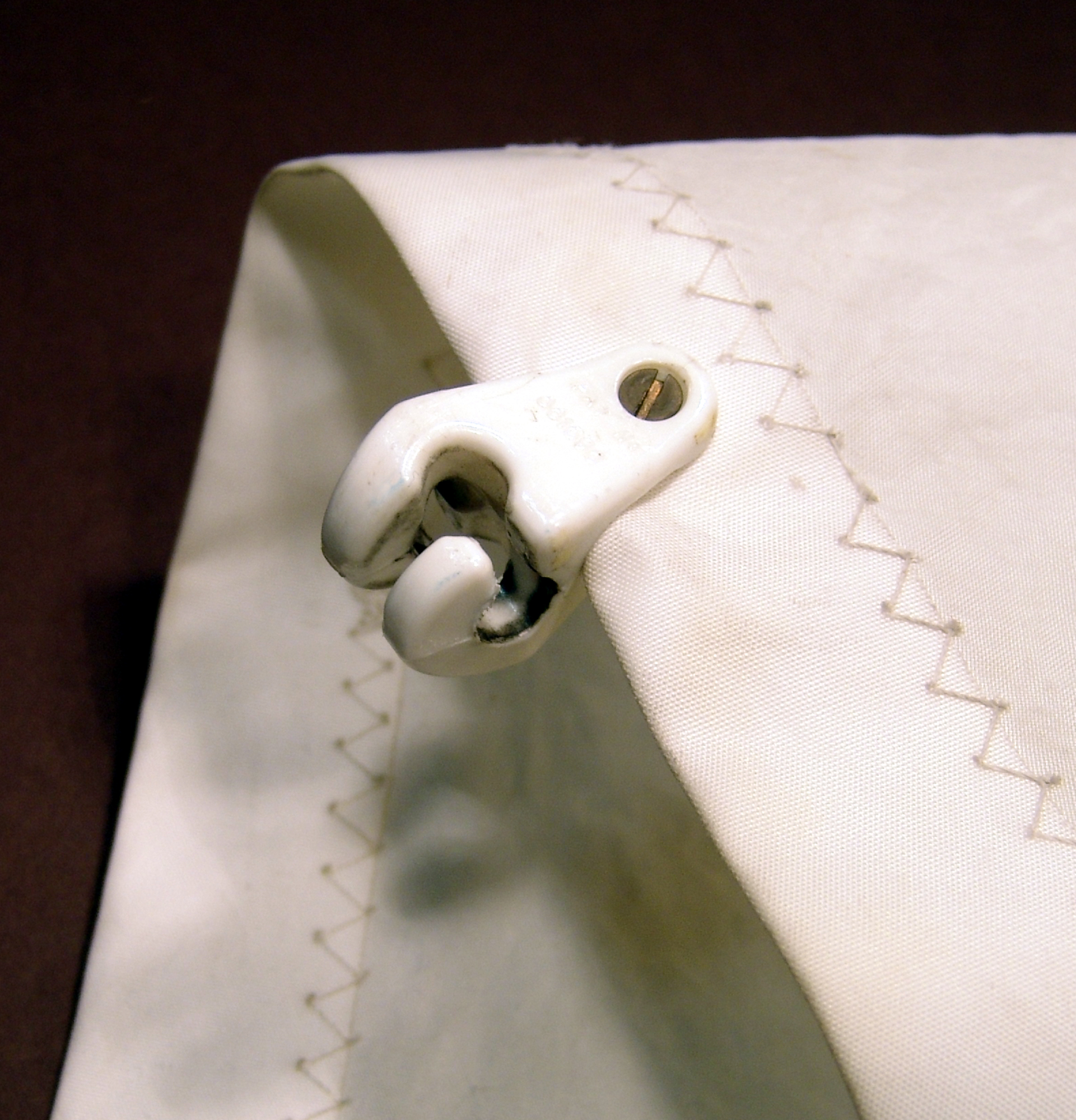 Stagreiter